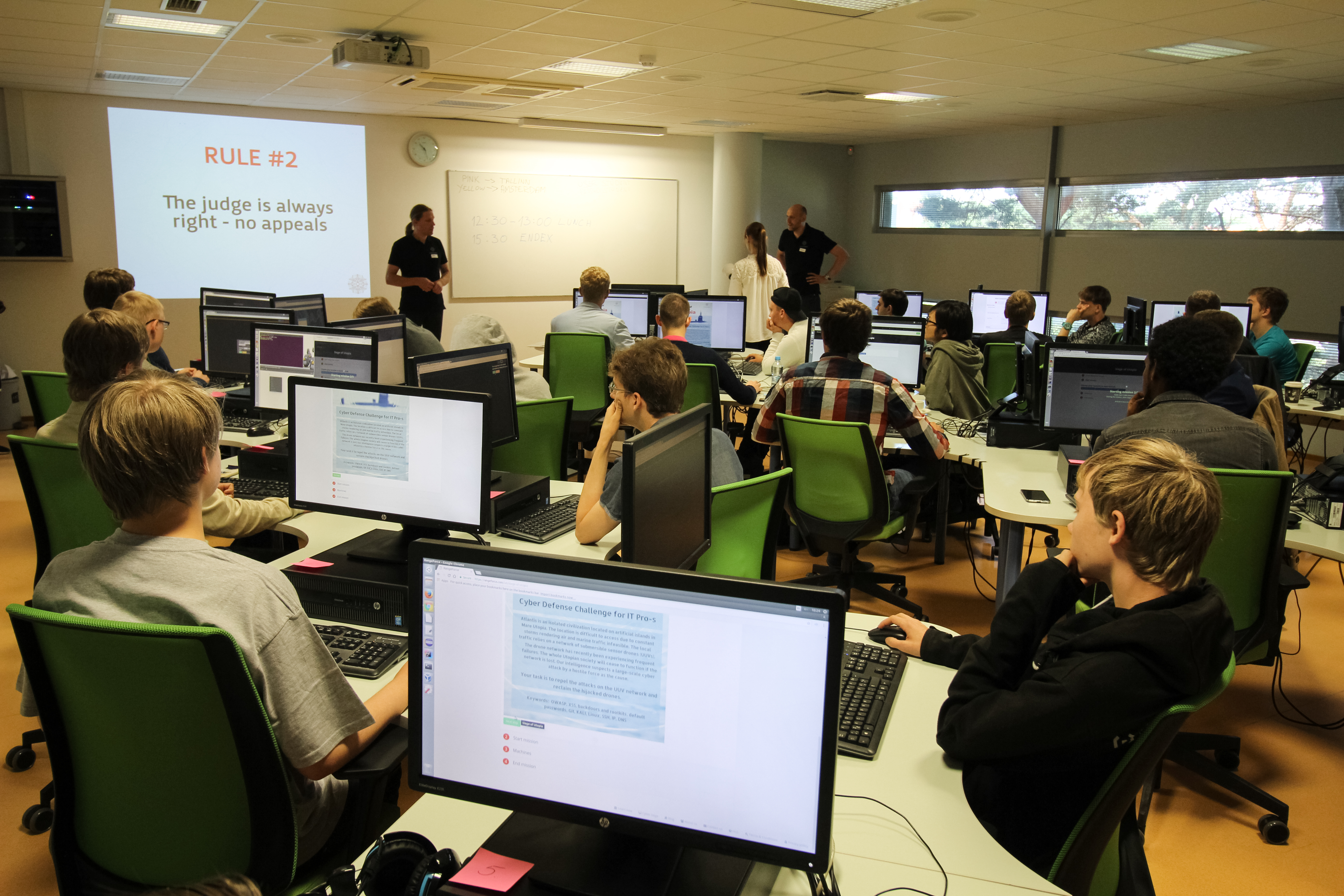 Küberolümpia 2017 osalejad